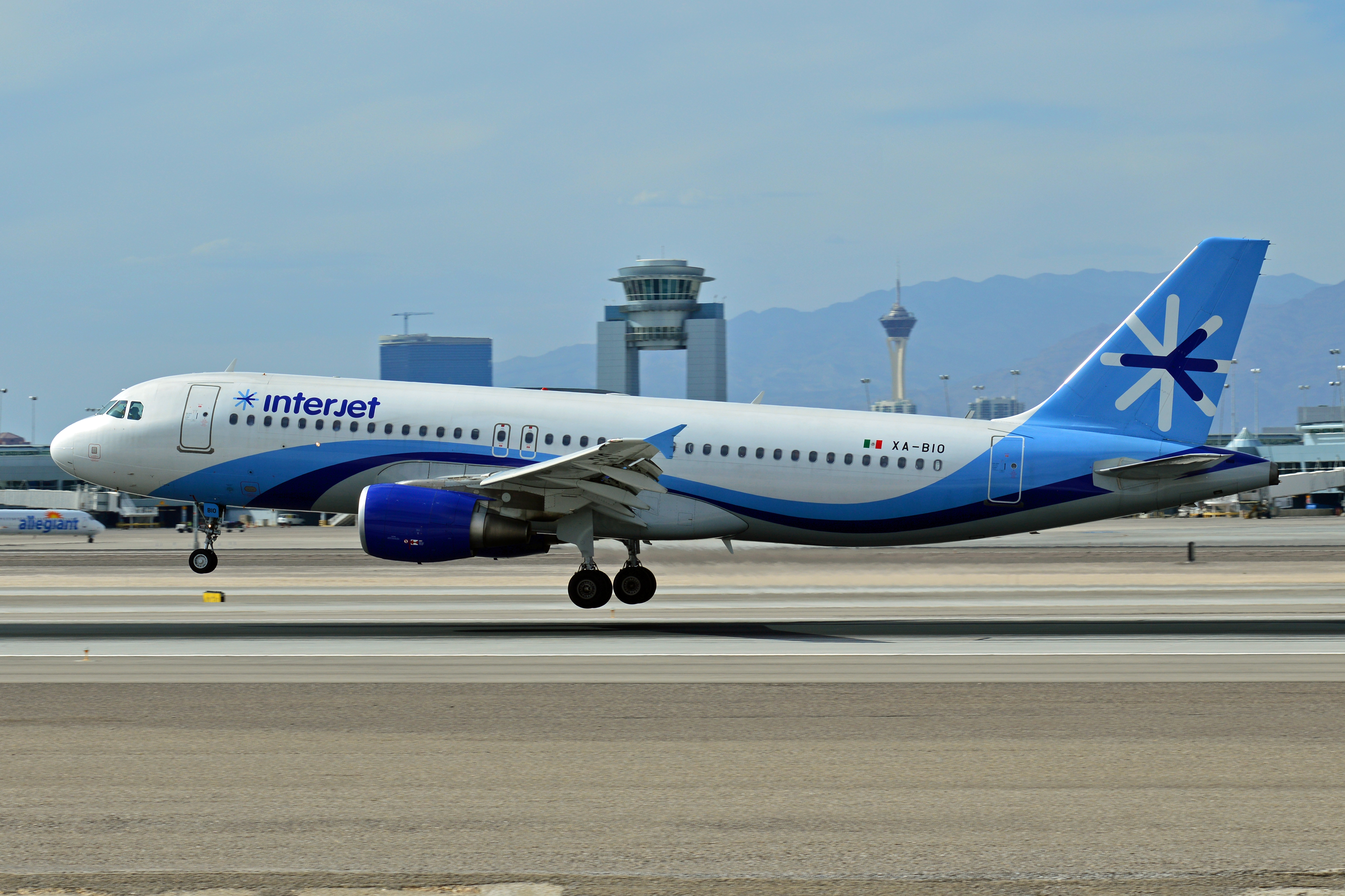 XA-BIO Airbus A320-214